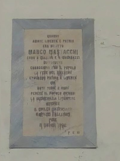 Lapide posta nella via omonima